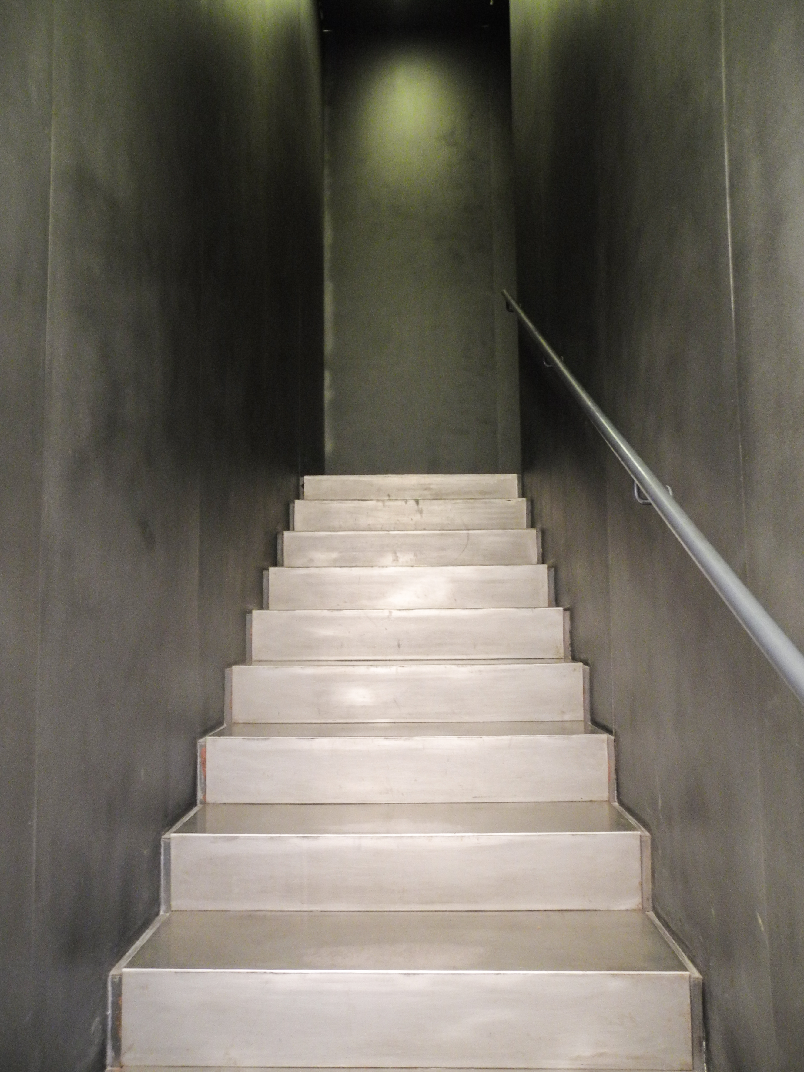 Treppe UG-EG